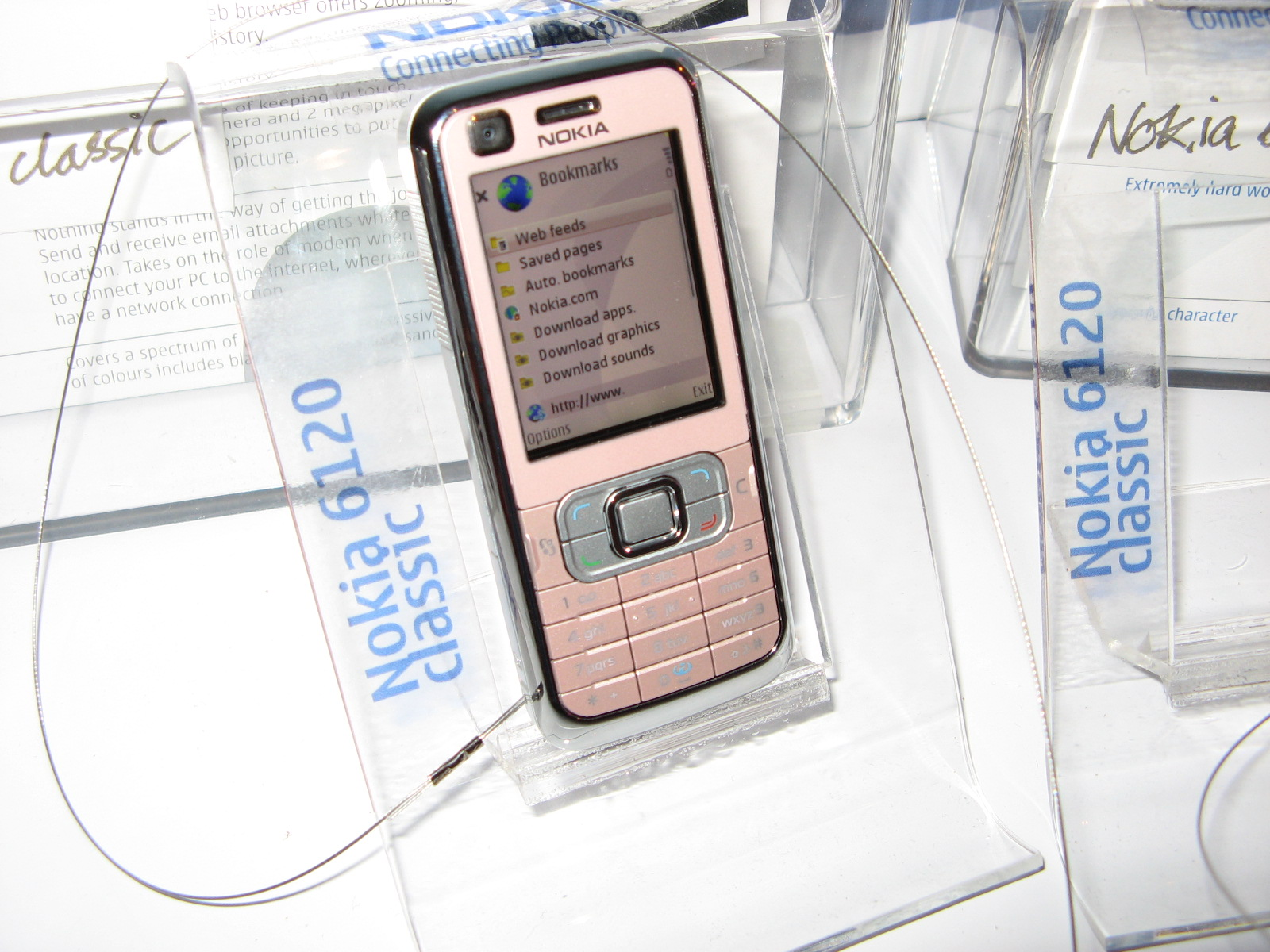 Nokia 6120 Classic